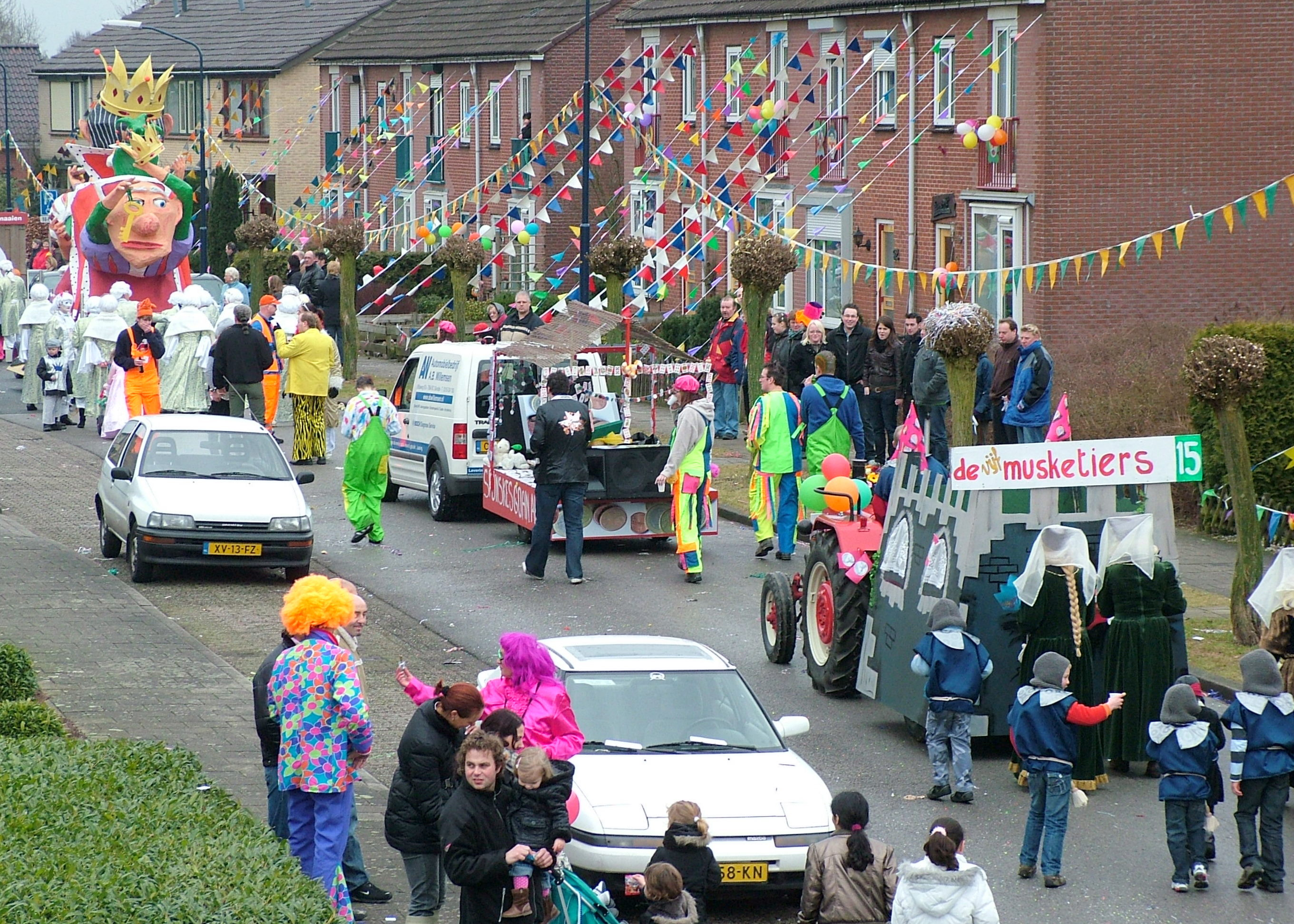 Karneval in Silvolde.